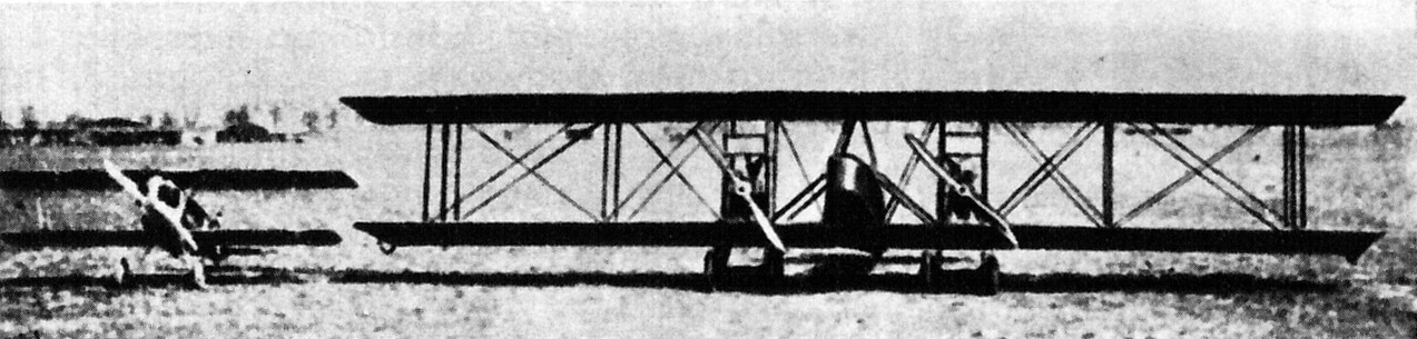 Czechosłowacki samolot bombowy Aero A.24.